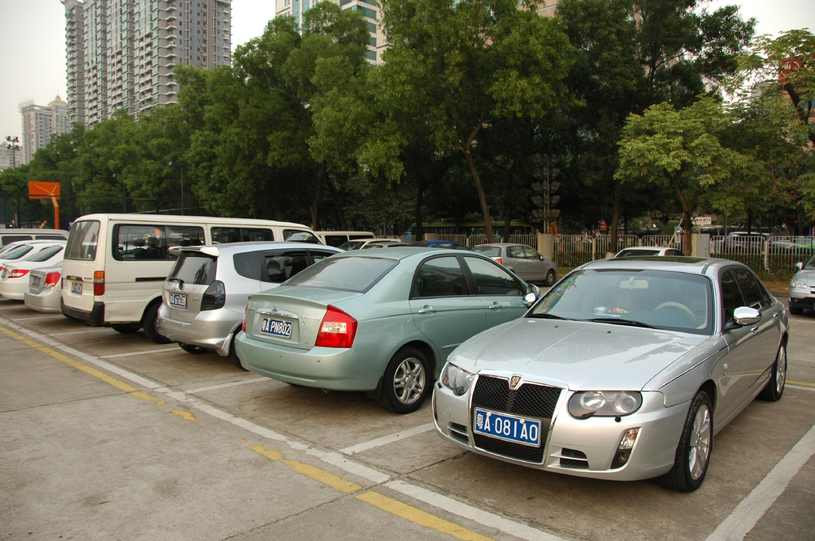 Roewe 750